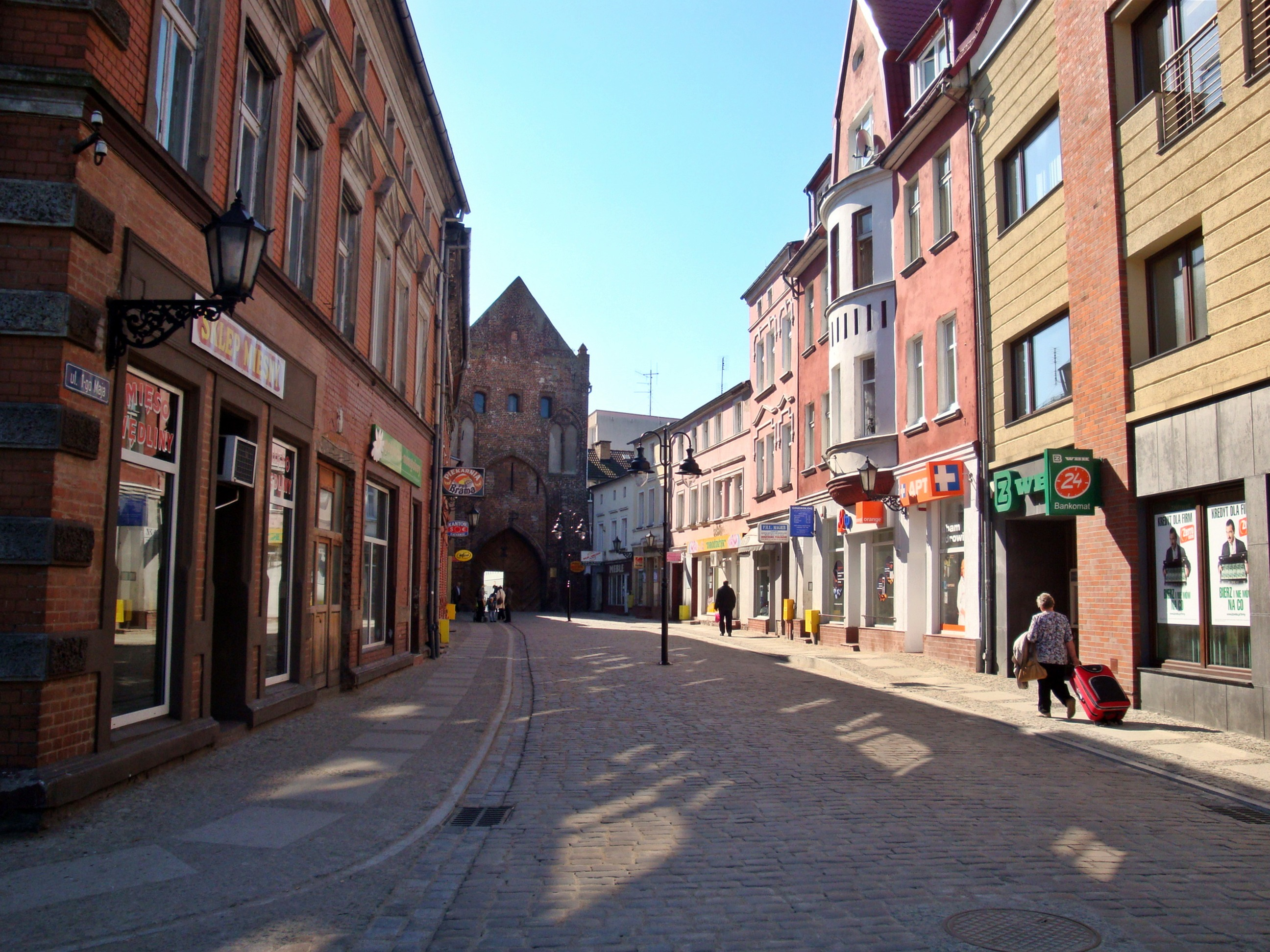 ul. 1 Maja w Świdwnie, obecna starówka.